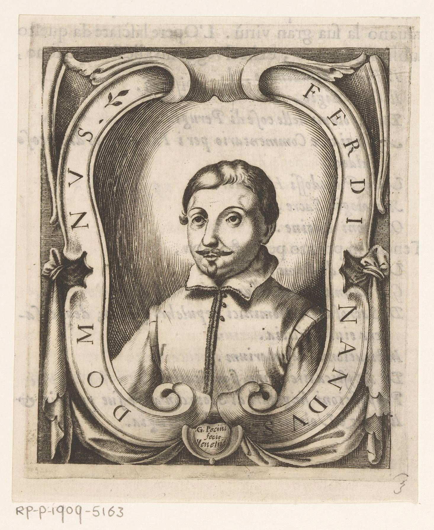 IdentificatieTitel(s): Portret van dichter Ferdinando DonnoObjecttype: prent boekillustratie Objectnummer: RP-P-1909-5163Opschriften / Merken: verzamelaarsmerk, verso, gestempeld: Lugt 2228VervaardigingVervaardiger: prentmaker: Giacomo Piccini (vermeld op object)uitgever: Francesco ValvasensePlaats vervaardiging: VenetiëDatering: 1647Fysieke kenmerken: gravure; verso met tekst in boekdrukMateriaal: papier Techniek: graveren (drukprocedé) / boekdrukAfmetingen: plaatrand: h 123 mm × b 103 mmToelichtingPrent uit de publicatie: Loredan, Giovan Francesco. Le glorie degli Incogniti. Venetië: Francesco Valvasense, 1647, p. 132.OnderwerpWat: historical personswriter, poet, authorWie: Ferdinando DonnoVerwerving en rechtenVerwerving: aankoop 1905Copyright: Publiek domein